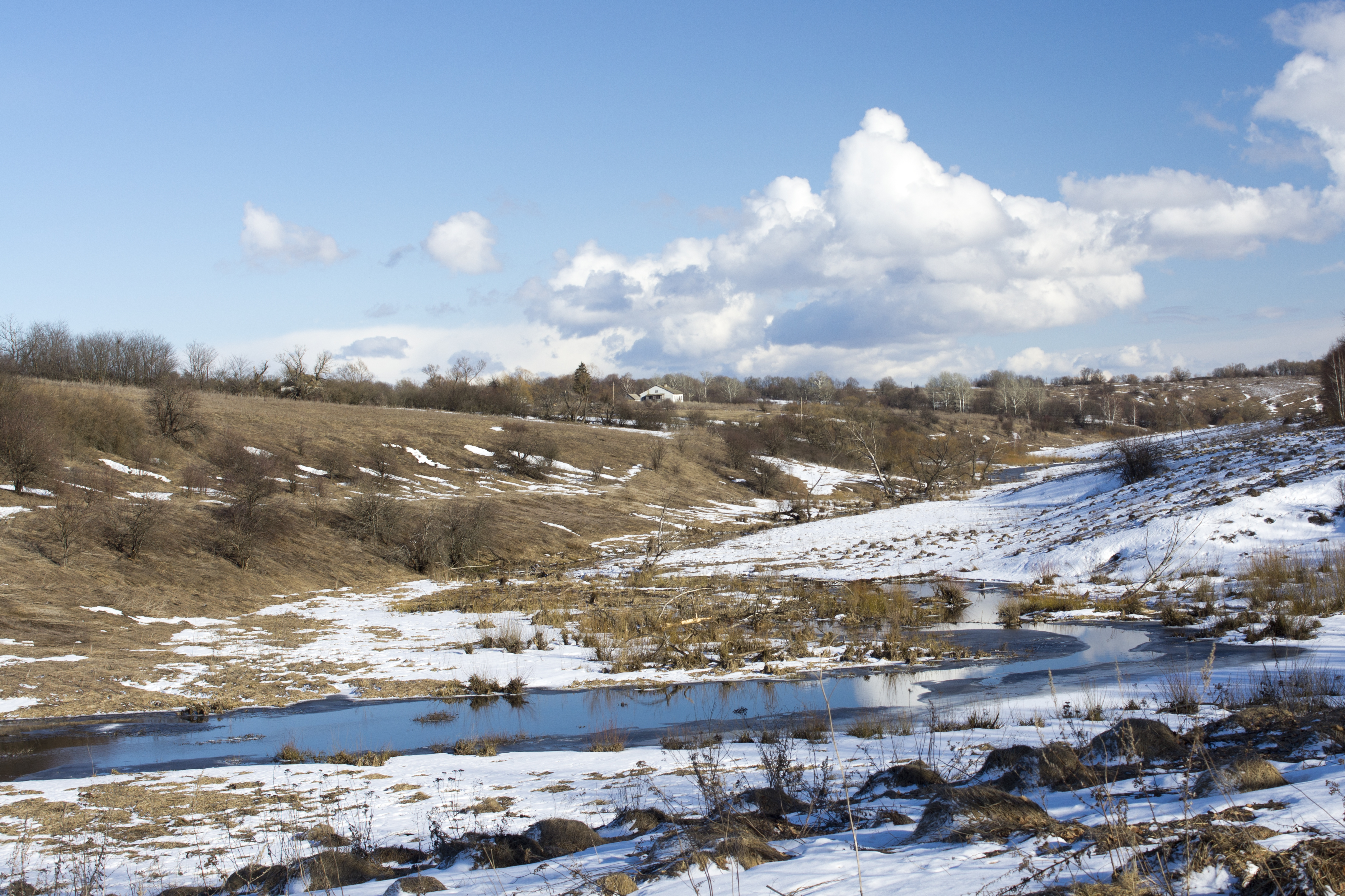 Река Малая Раковка близ села Покровка